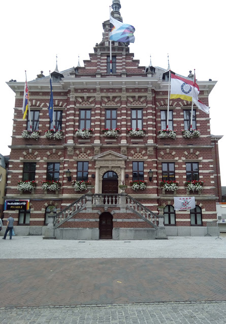 Stadhuis van Kerkrade